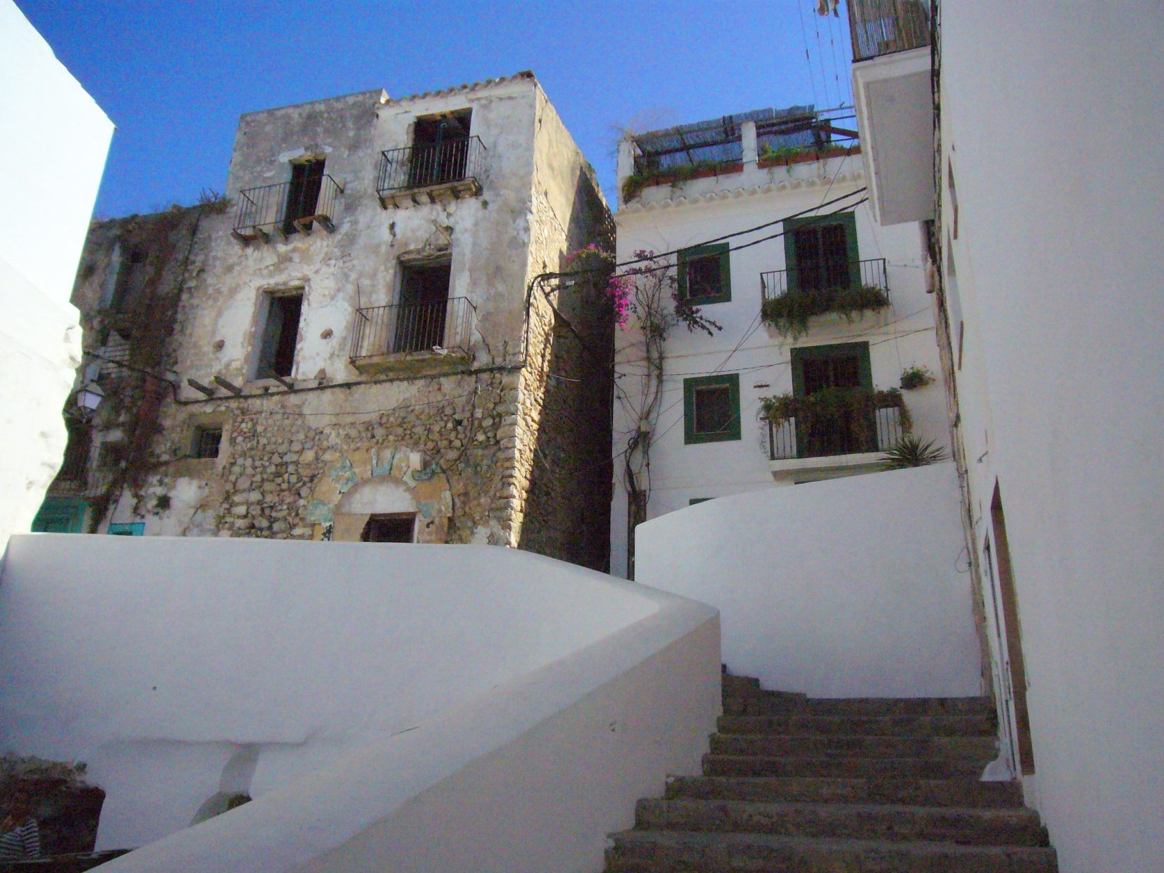 Dalt Vila